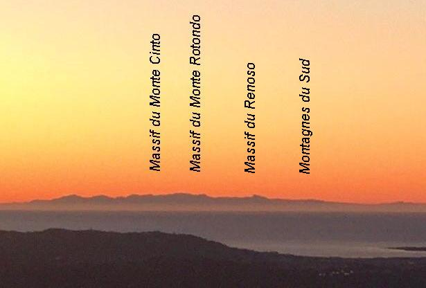 La ligne des sommets de la Corse vue du village de CABRIS. Photo prise le matin en décembre